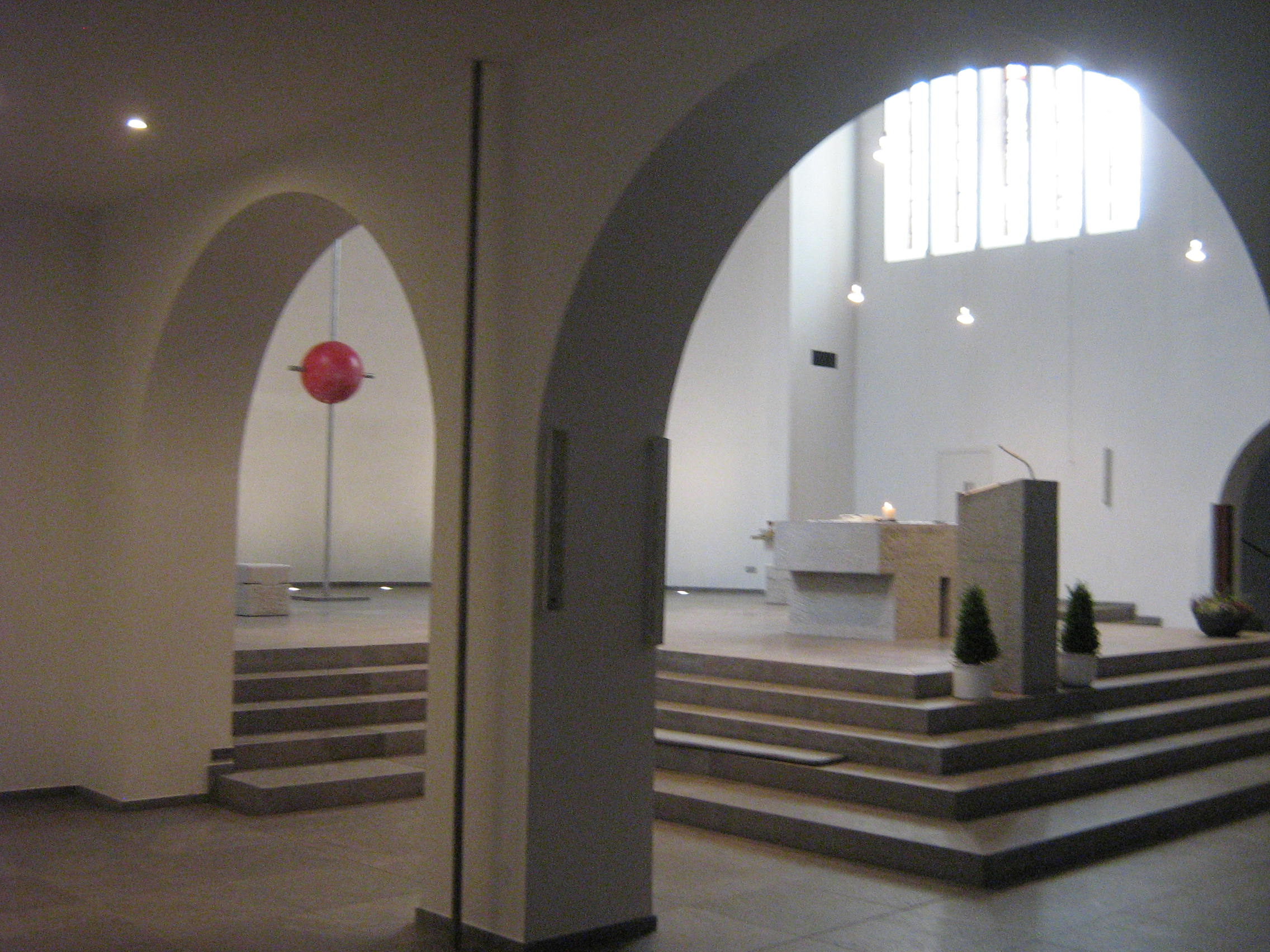 St. Josephs-Kirche Bielefeld - Blick aus dem Seitenschiff